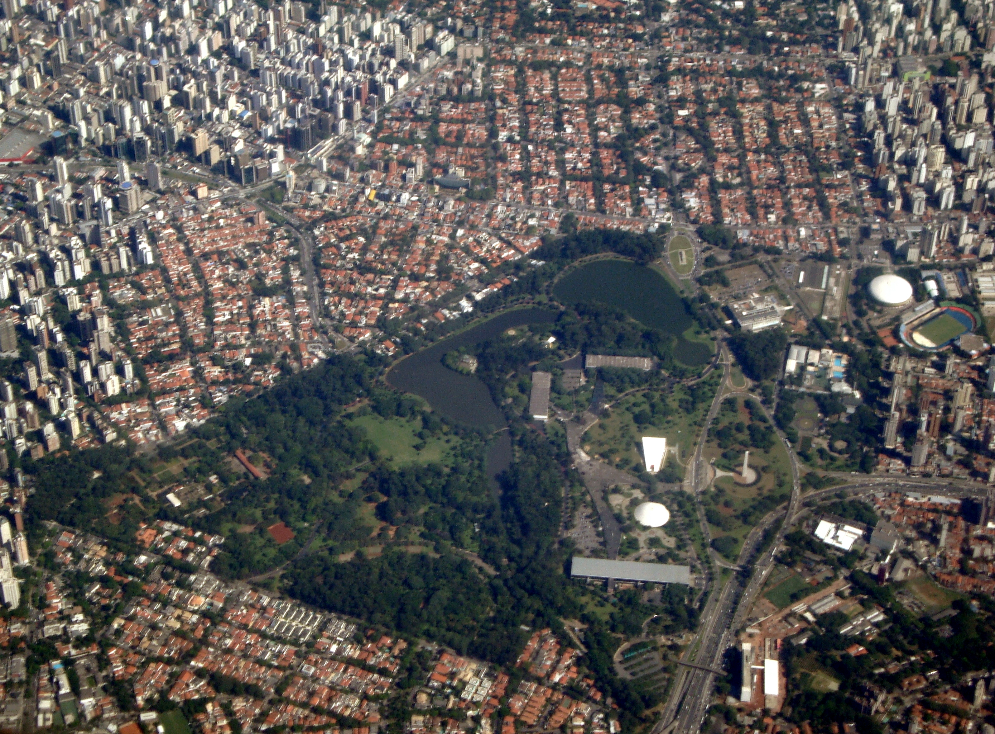 Vista aérea do Parque do Ibirapuera, São Paulo, Brasil.